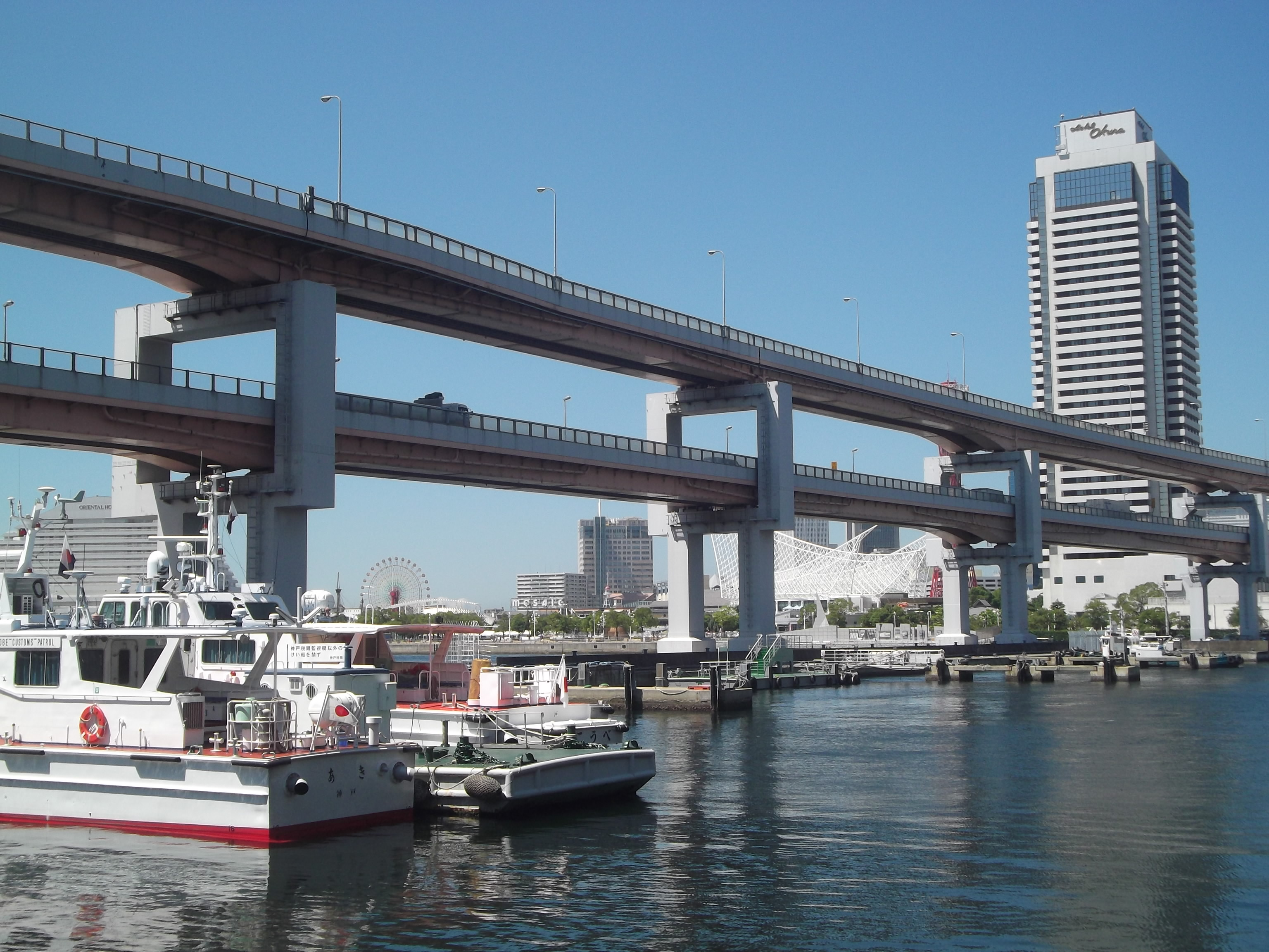 神戸港。京橋付近。